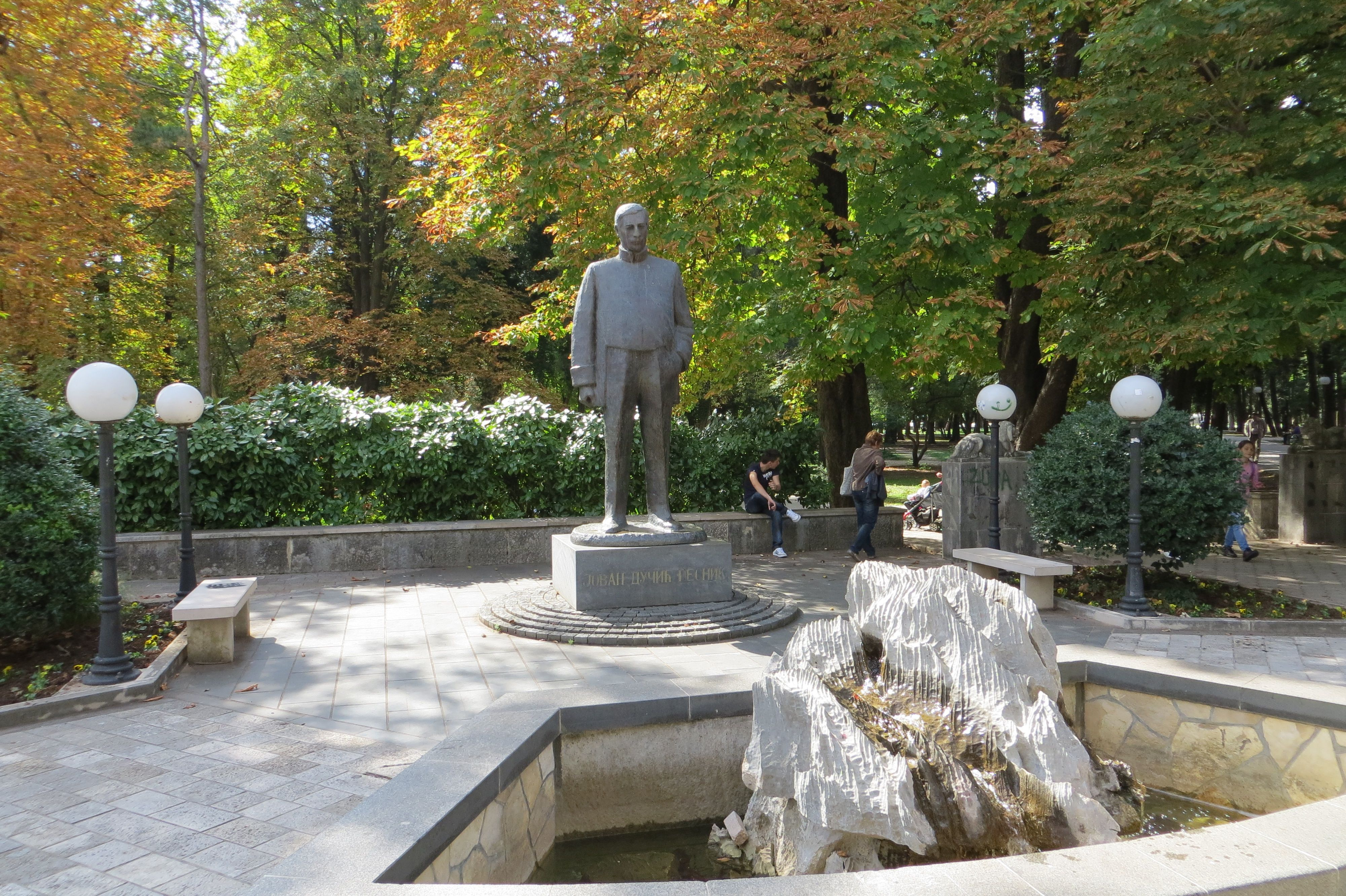 Jovan Dučić